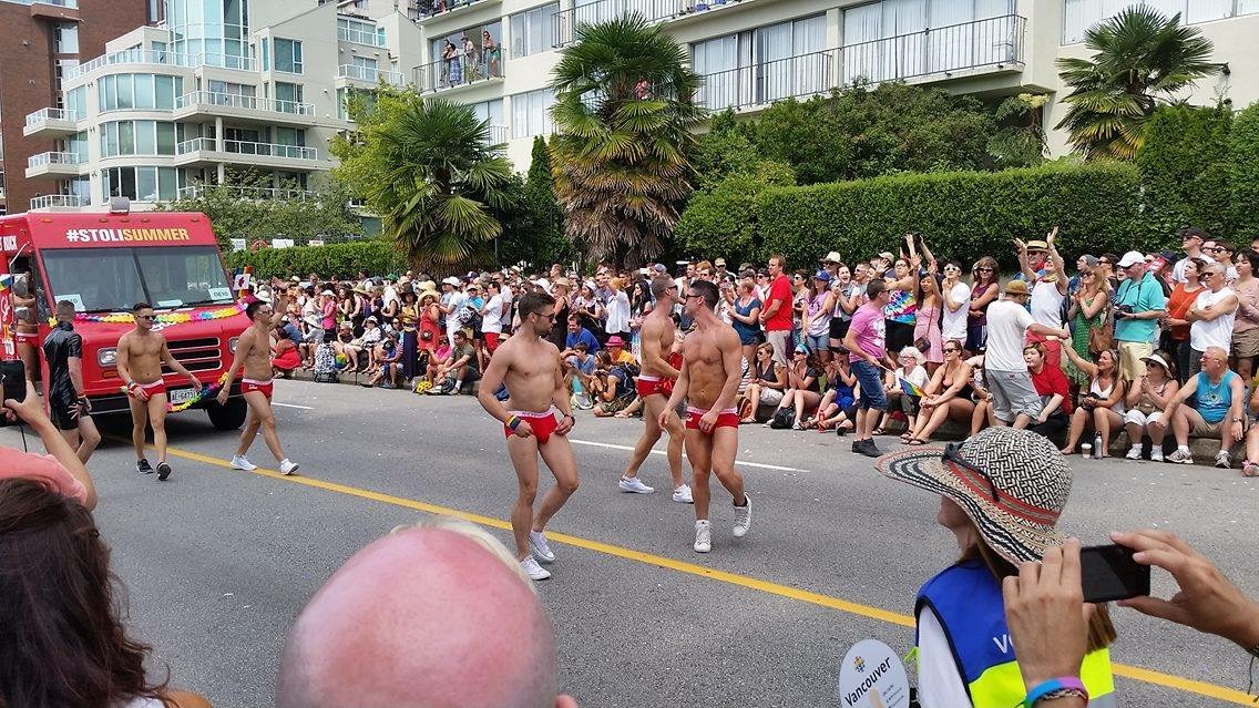 戴維村驕傲遊行